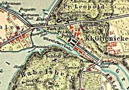 Karte Glienicker Laake aus Meyers Karte Umgebung von Potsdam, um 1900, Maßstab 1:42.000 (Ausschnitt)